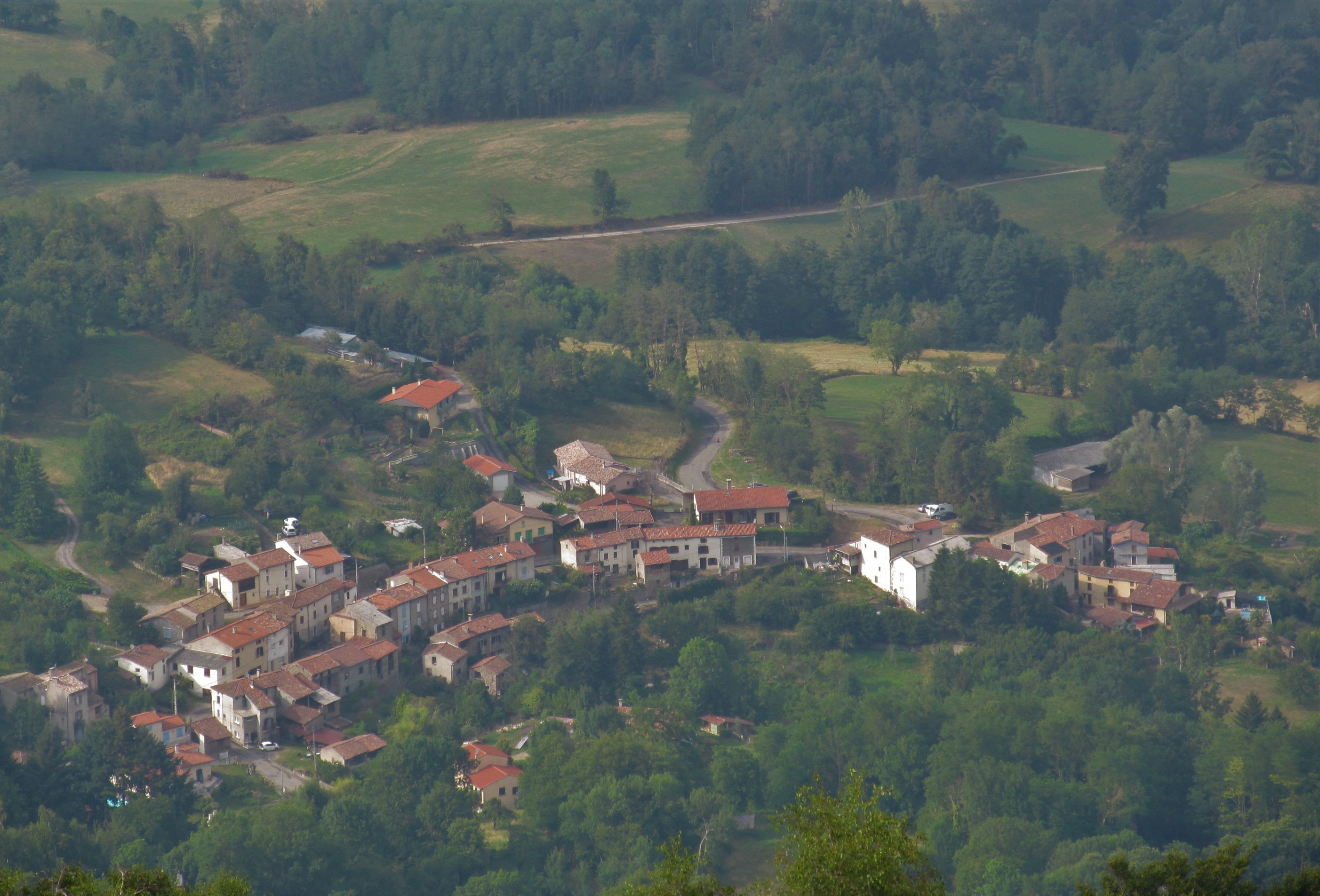 Vue du hameau de Lacassagne depuis le sentier de randonnée qui mène au Pape.